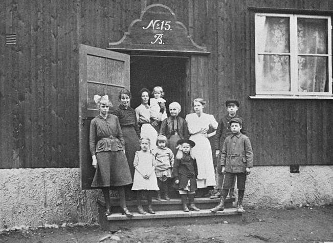 Inflyttade i en nödbostad i Stadshagen